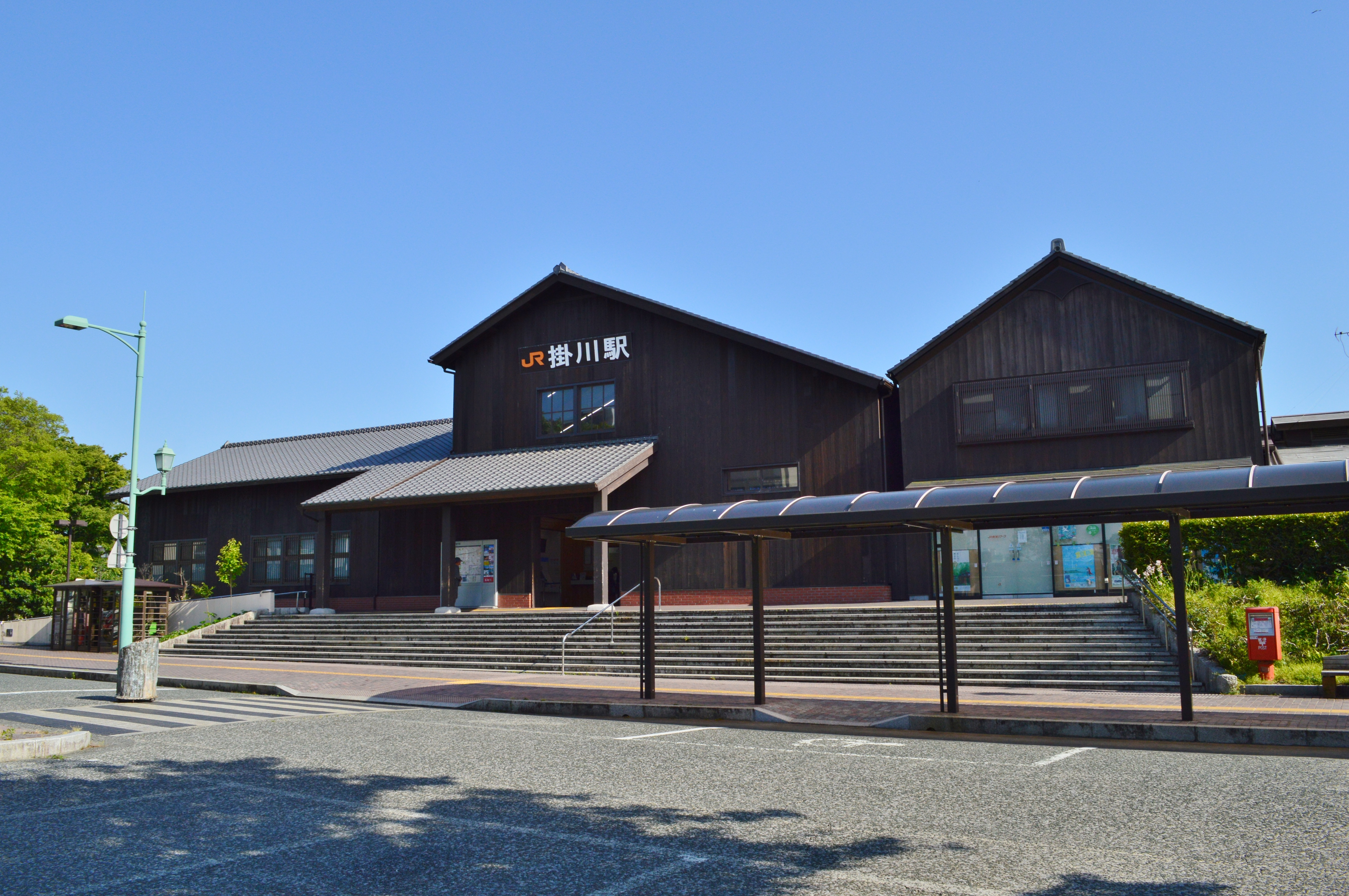 掛川駅 JR北口駅舎